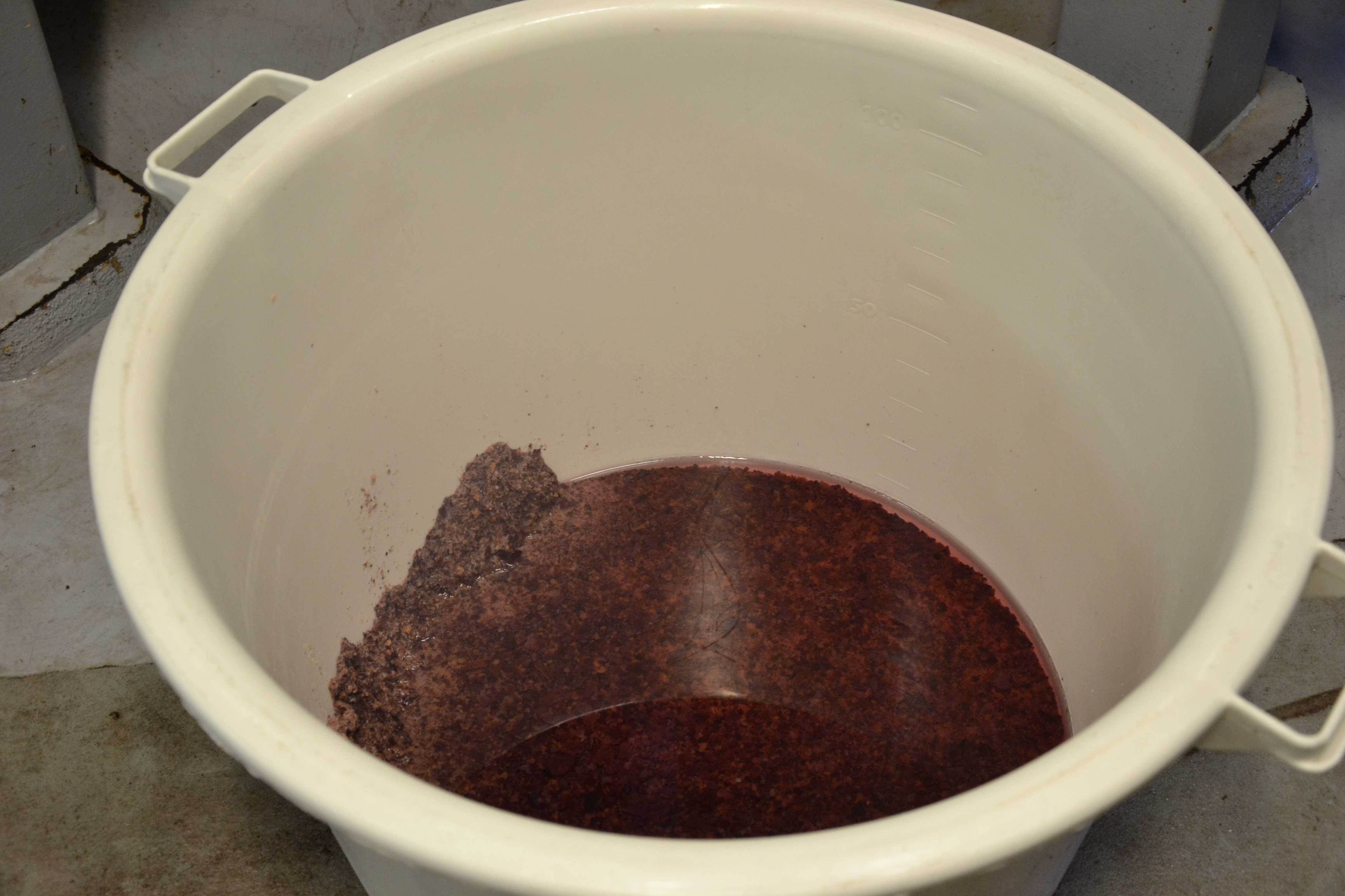 résidus de tartre après nettoyage cuves au Domaine de Montine